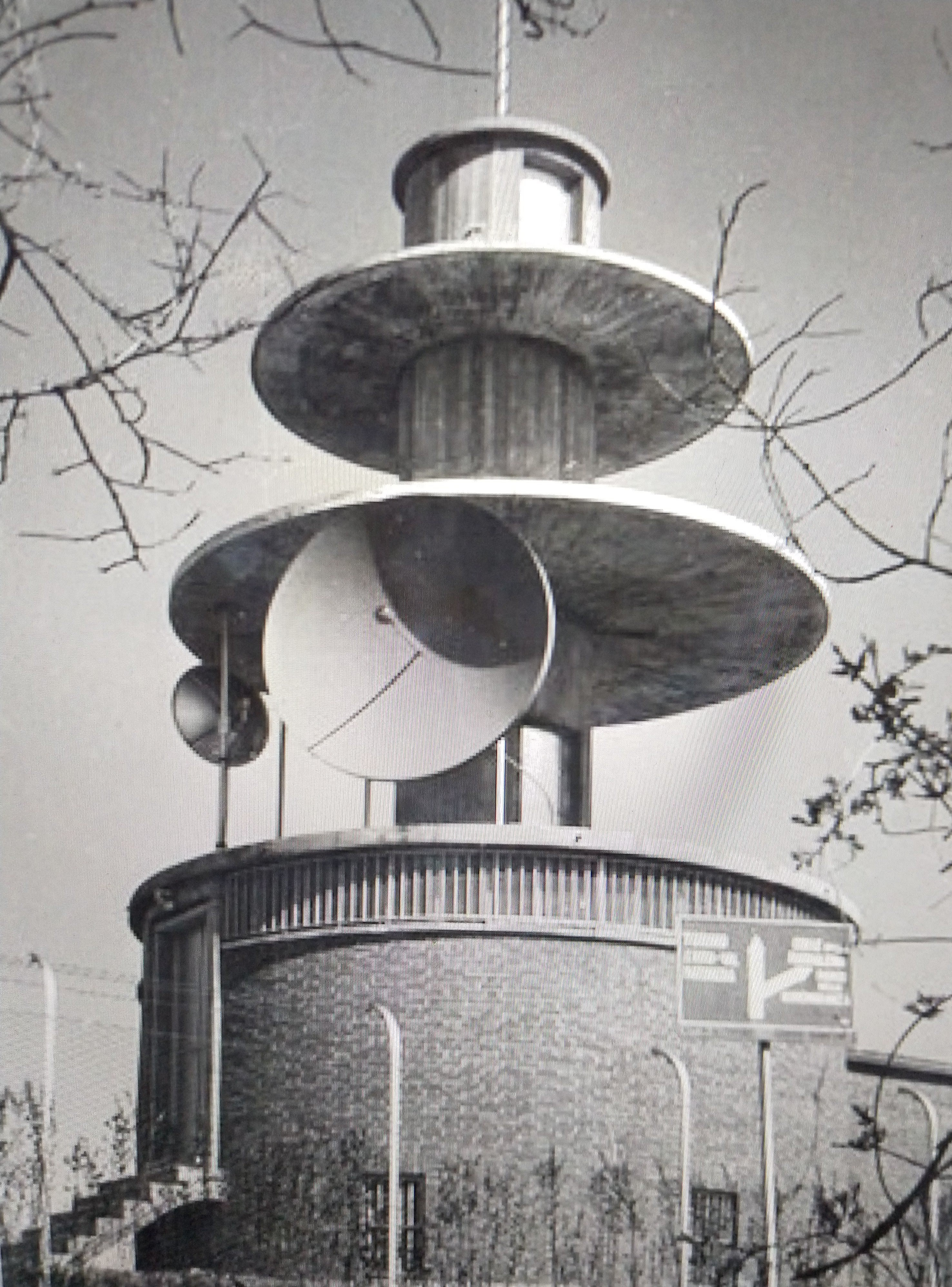 Antenna telefonica STIPEL sul colle della Maddalena a Torino, Arch. Ubaldo Castagnoli